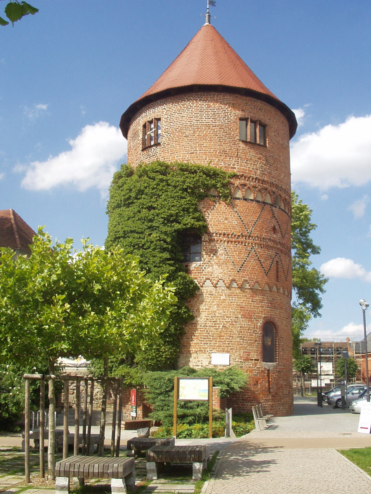 Alter Amsturm, Lübz, Germany